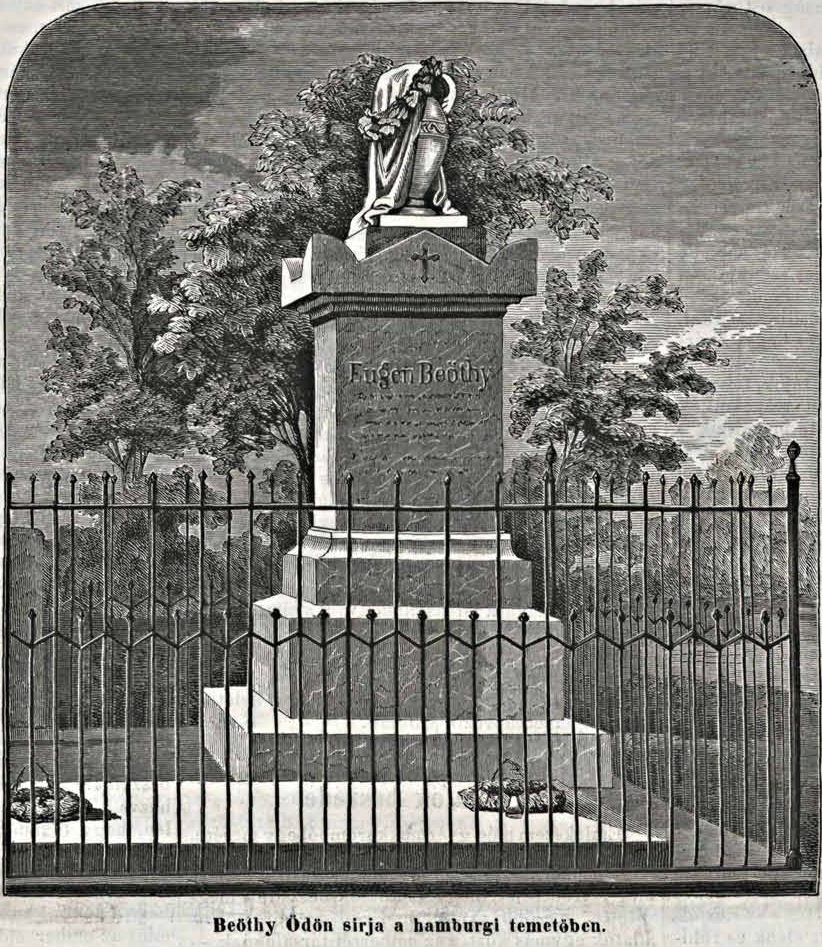 Beöthy Ödön (1796–1854) politikus sírja Hamburgban (Vasúrnapi Újság, 1868. június 28.)